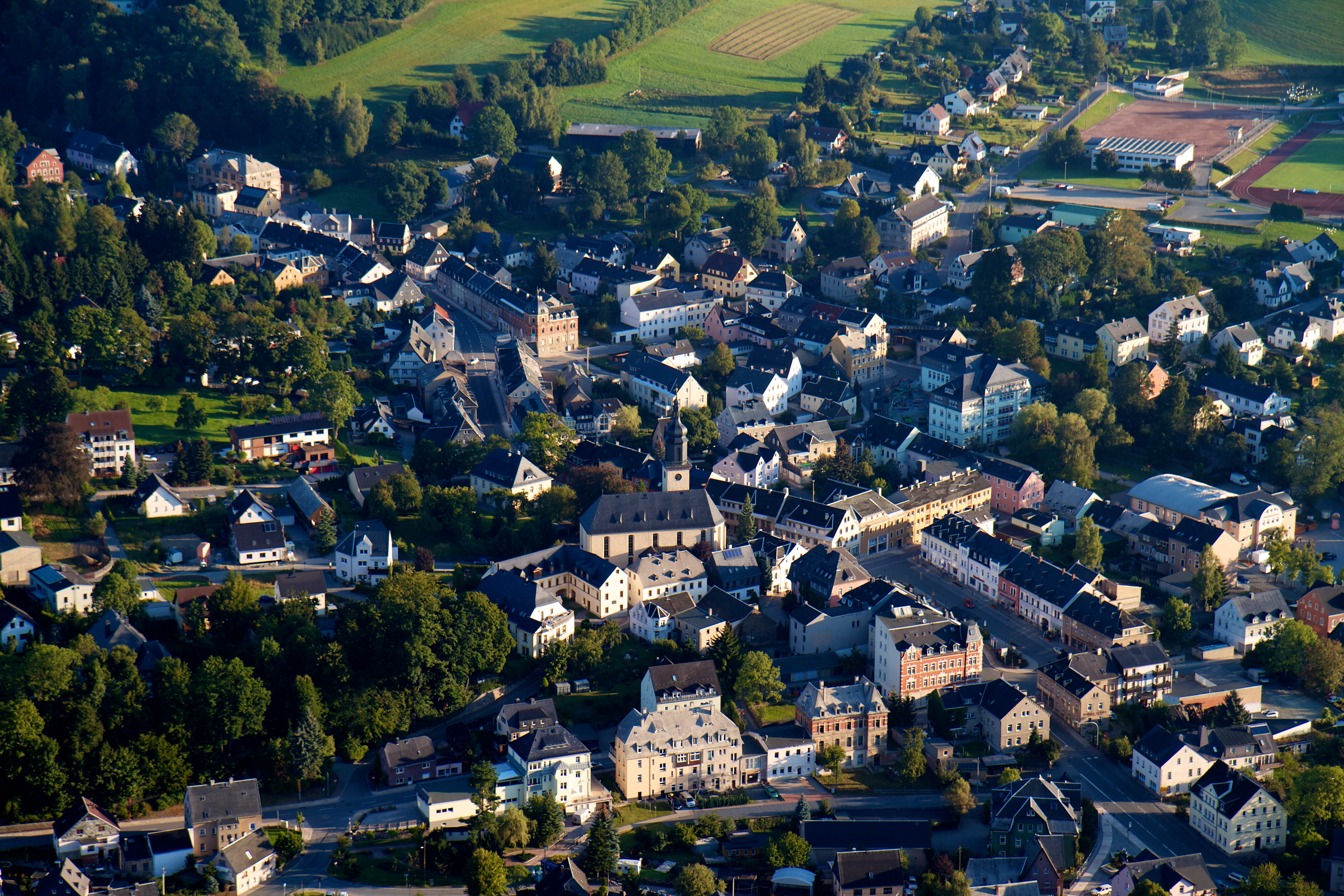 Das Luftbild von Thum im Erzgebirge ist bei einer Ballonfahrt am Morgen des 03.09.2011 entstanden.